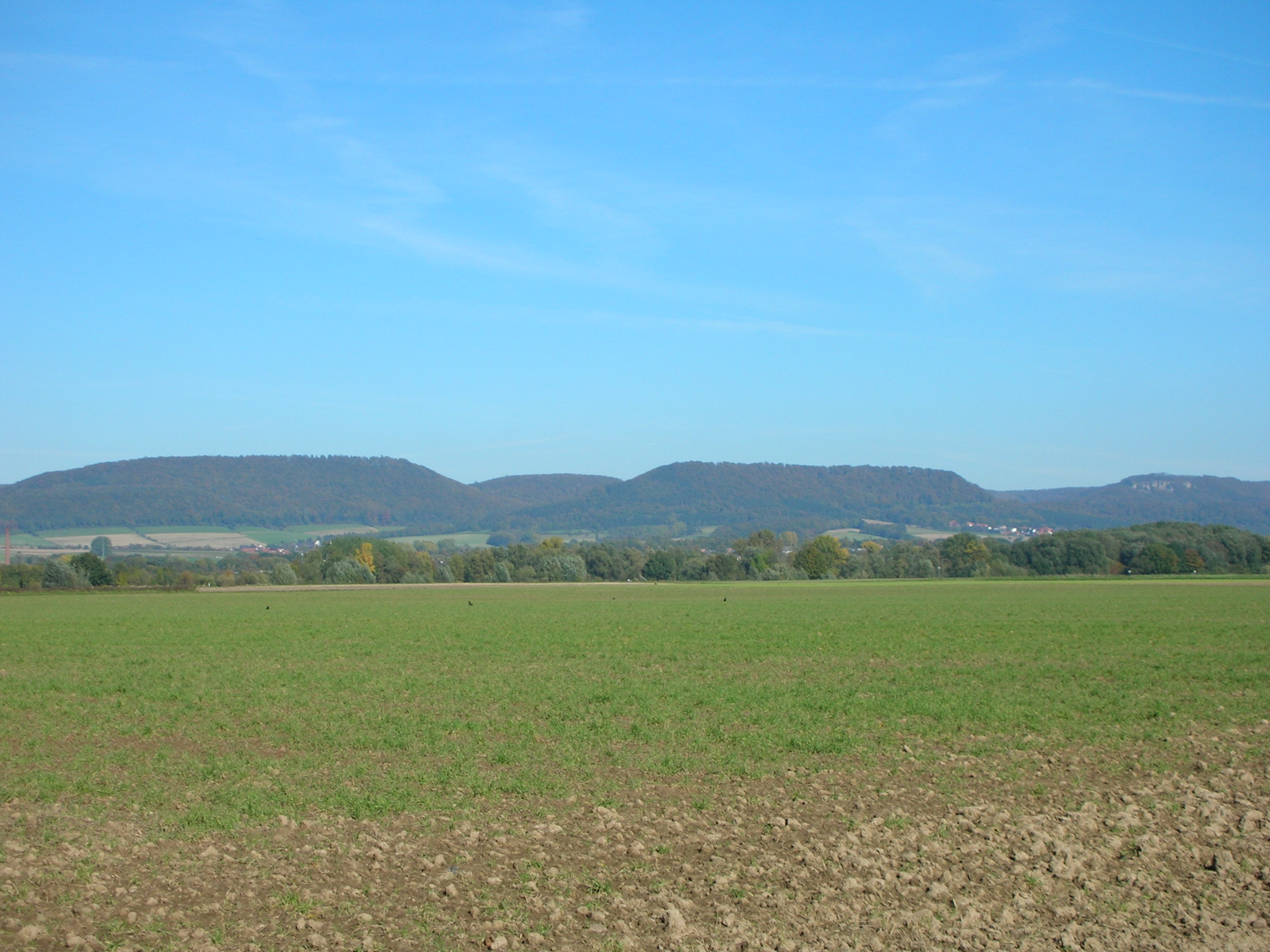 Amelungsburg, Mittelberg und Hohenstein im Süntel